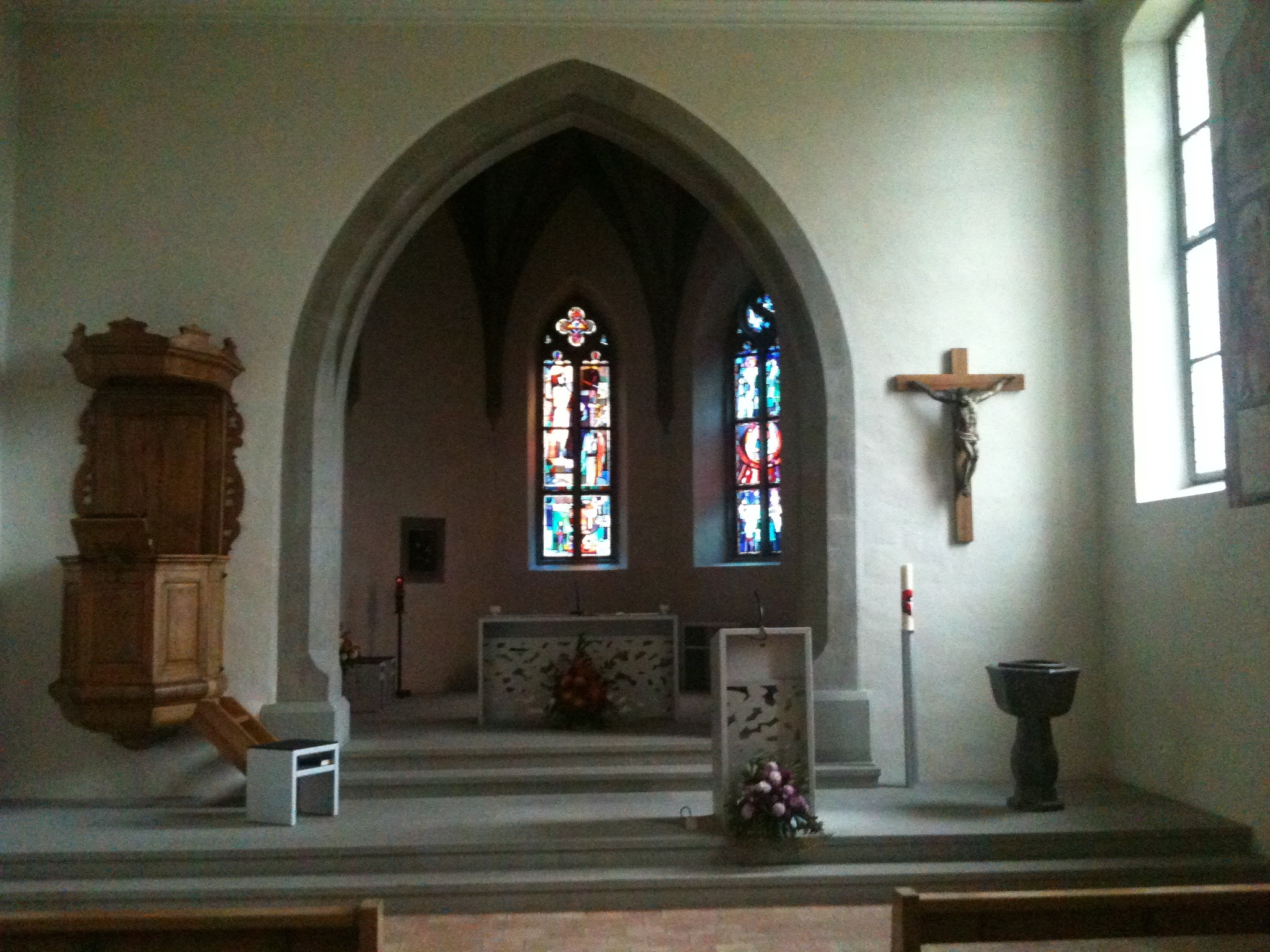 Kirche Oberhelfenschwil (Toggenburg, Kanton St. Gallen)